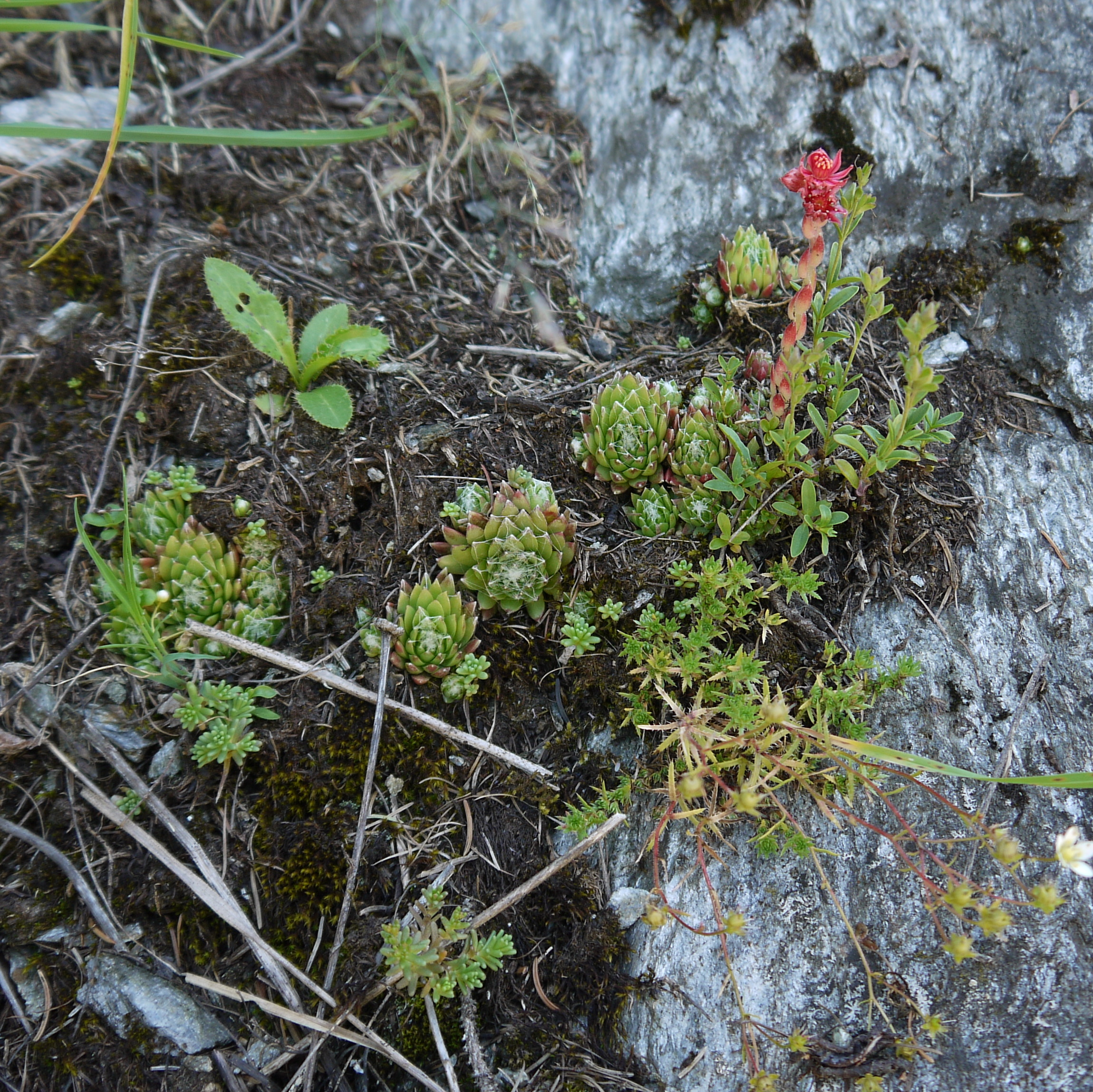 Sempervivum arachnoideum, auf der italienischen Seite des Timmelsjoch.